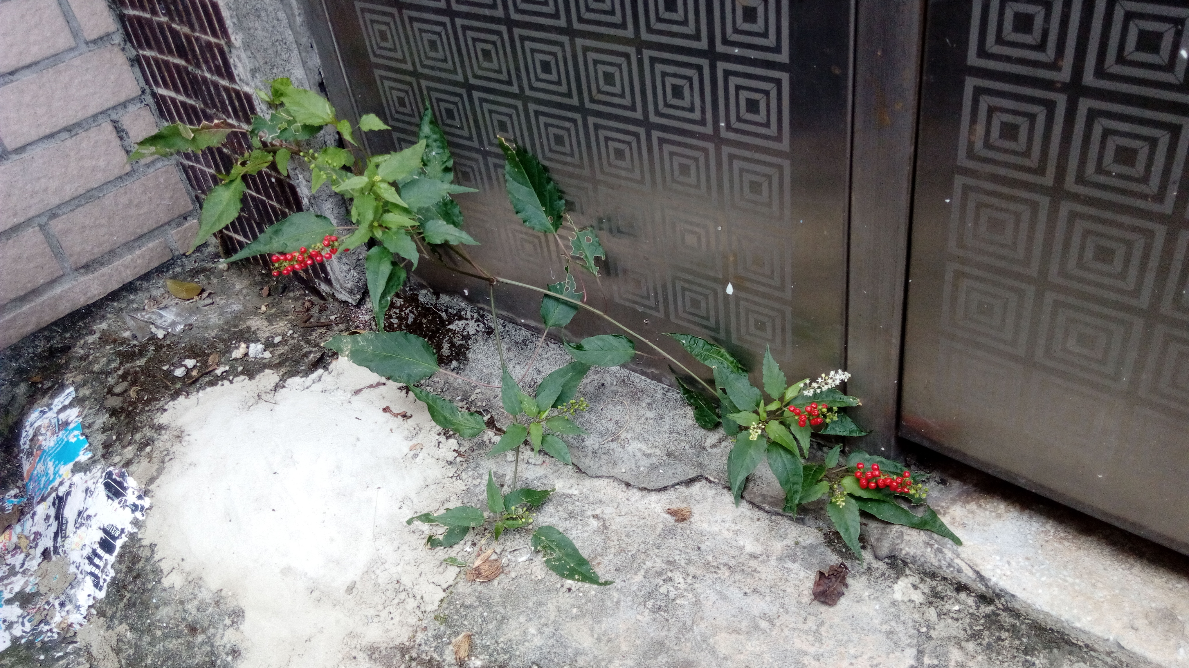 都會區的數珠珊瑚整體植珠與葉、白色的花與紅色果實